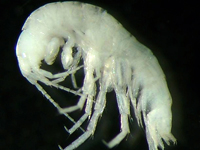 Kenk's amphipod (Stygobromus kenki)